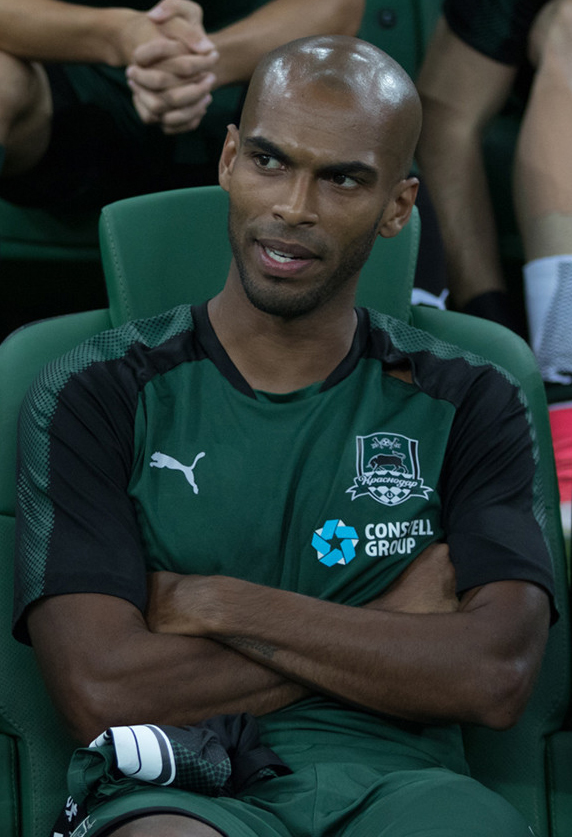 «Краснодар» - «Урал»